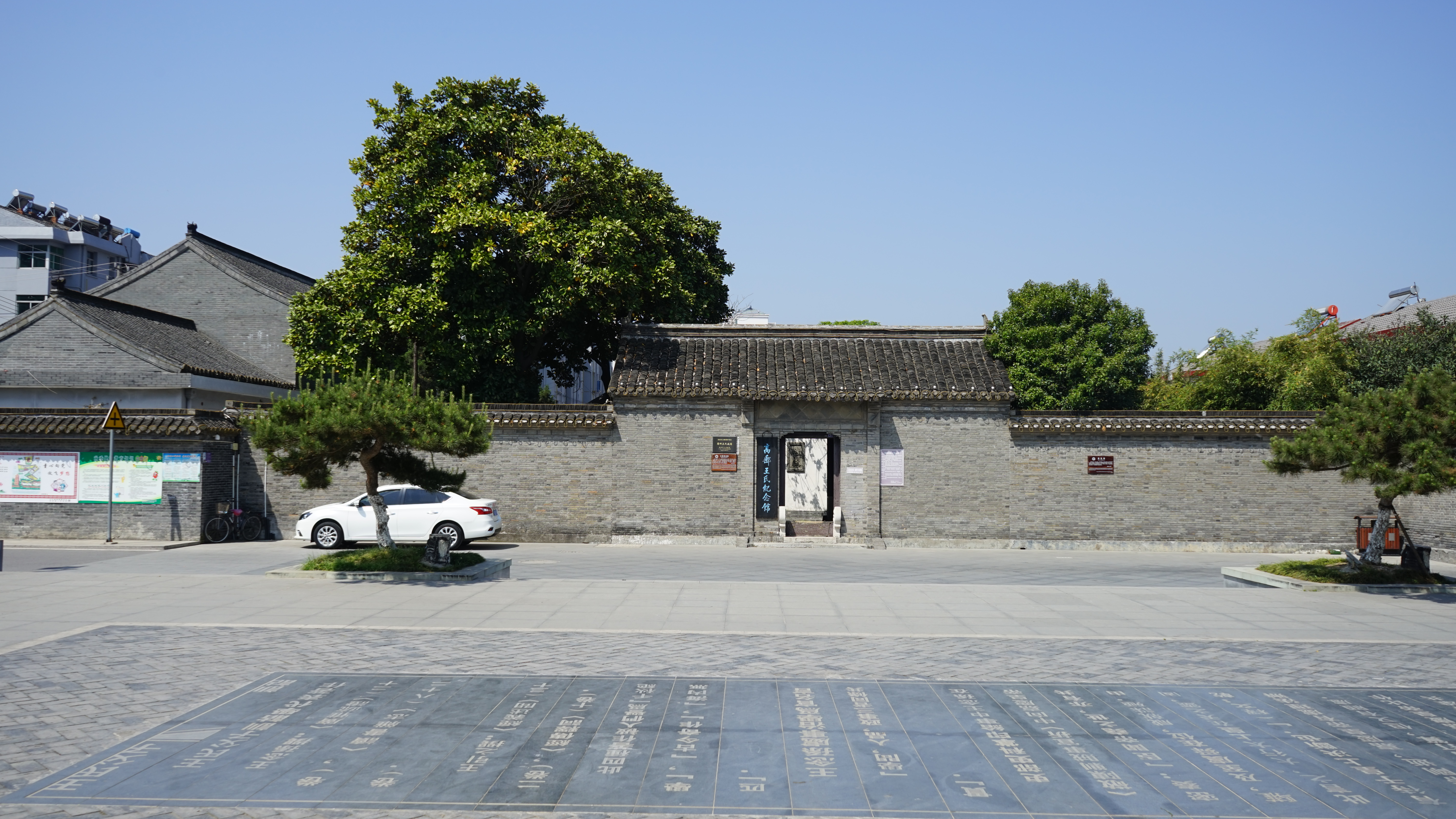 高邮王氏故居正门